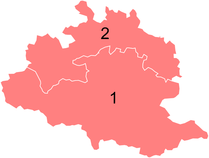 Résultats des élections législatives de l'Ariège en 2012